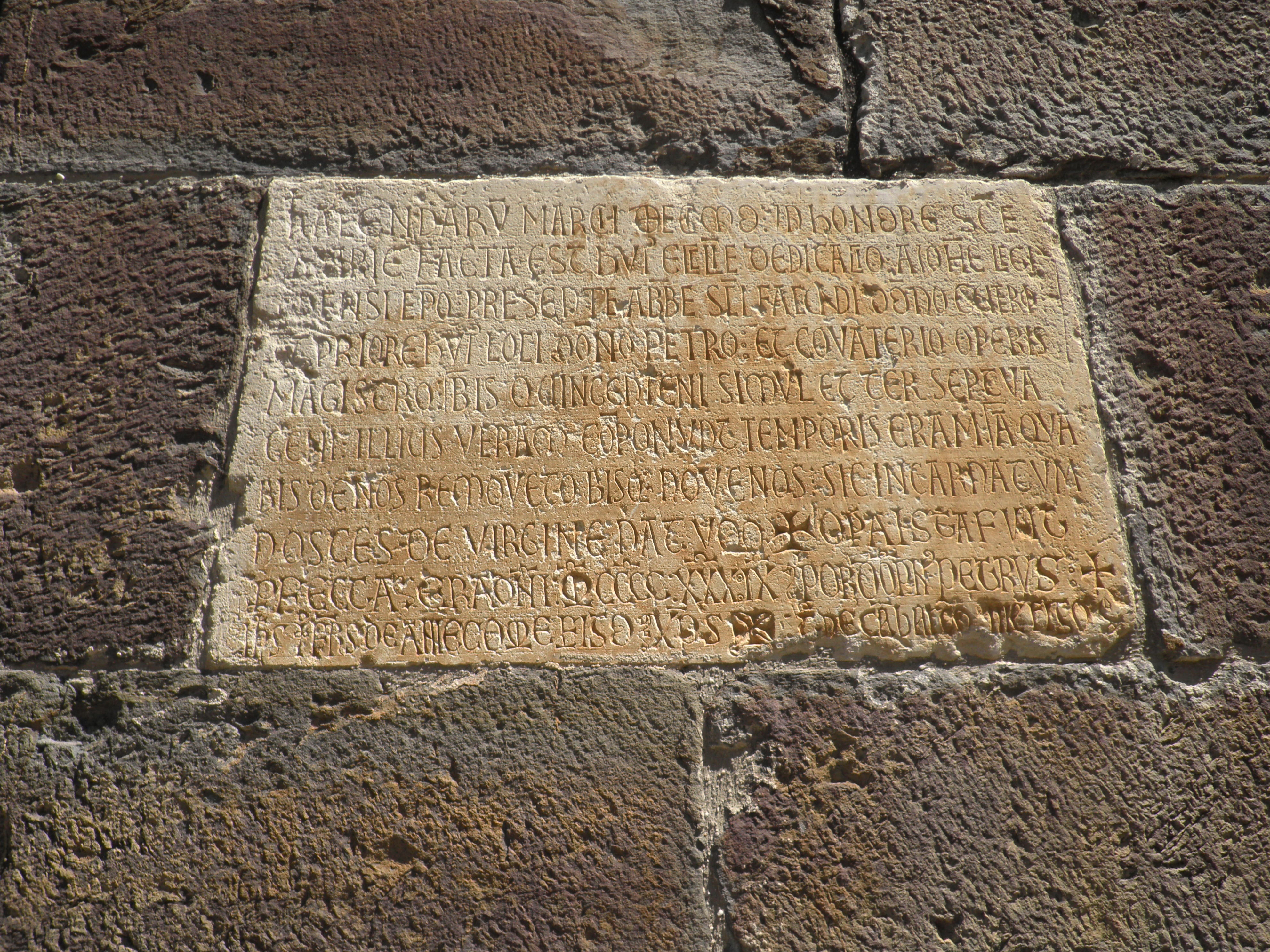 Inscripció en el mur de la façana de l'església romànica de Santa Maria a Piasca (Cabezón de Liébana, Cantàbria)